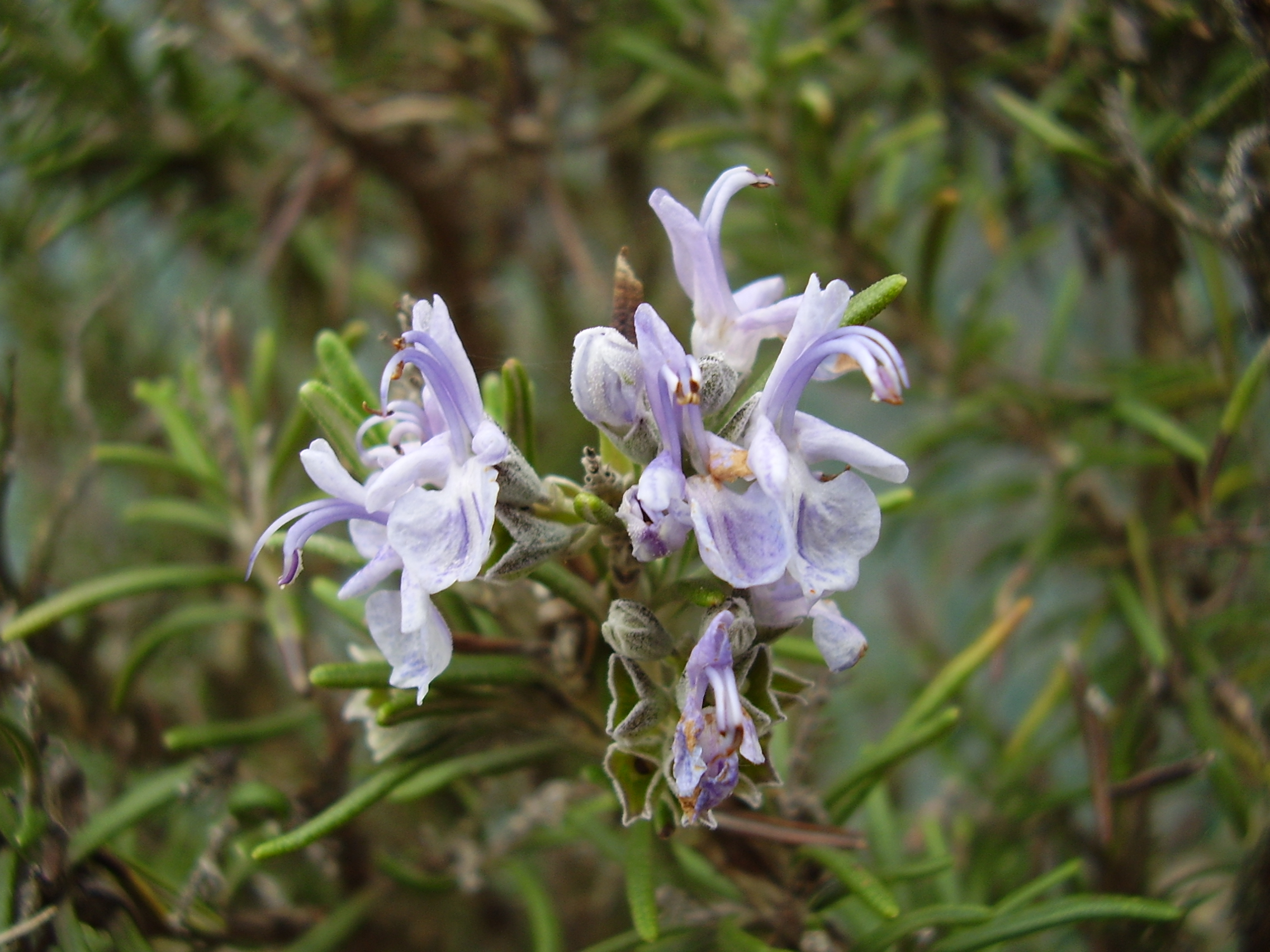 Fiori di Rosmarinus officinalis (rosmarino).